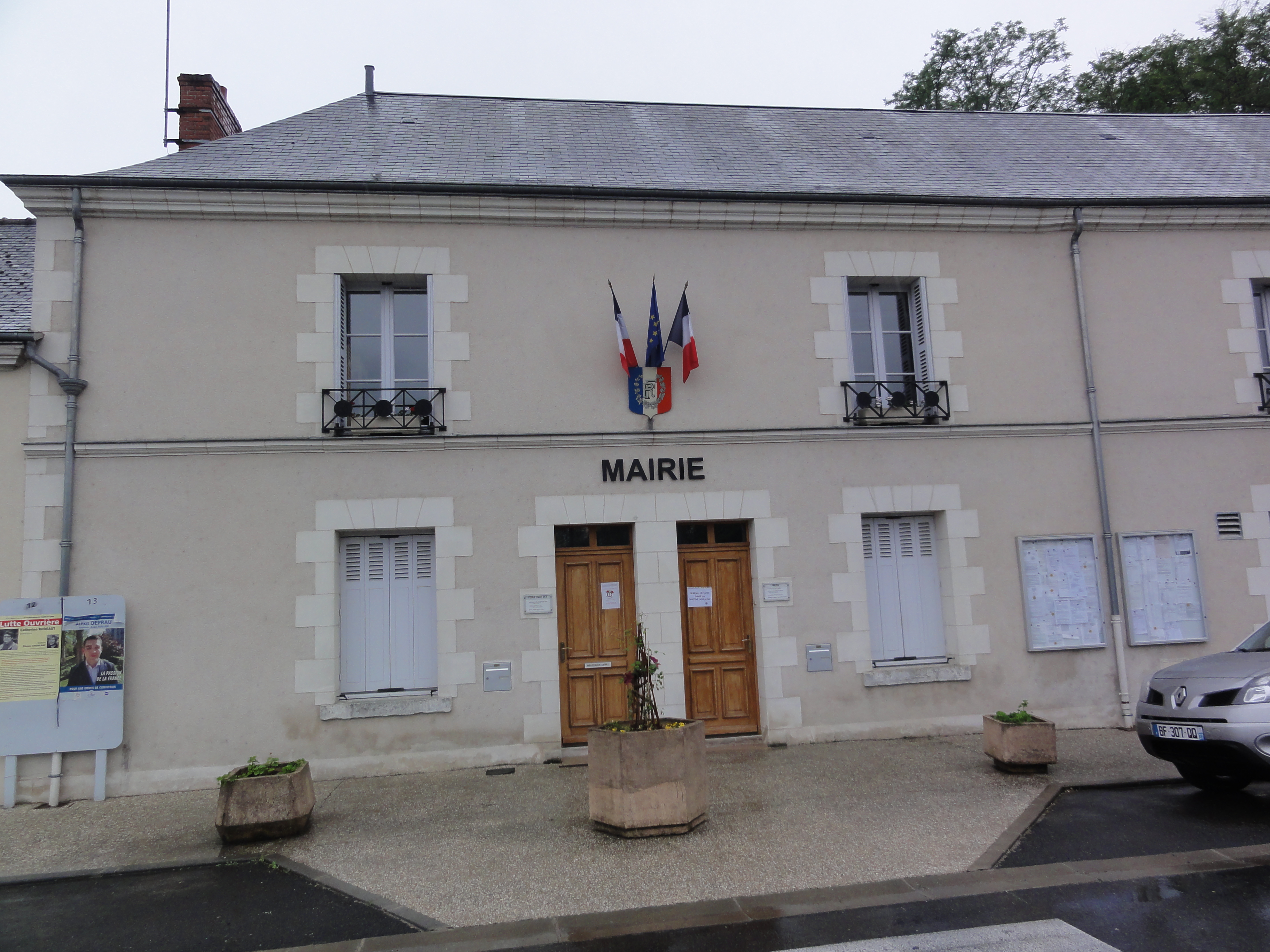 Lussault-sur-Loire (Indre-et-Loire) Mairie